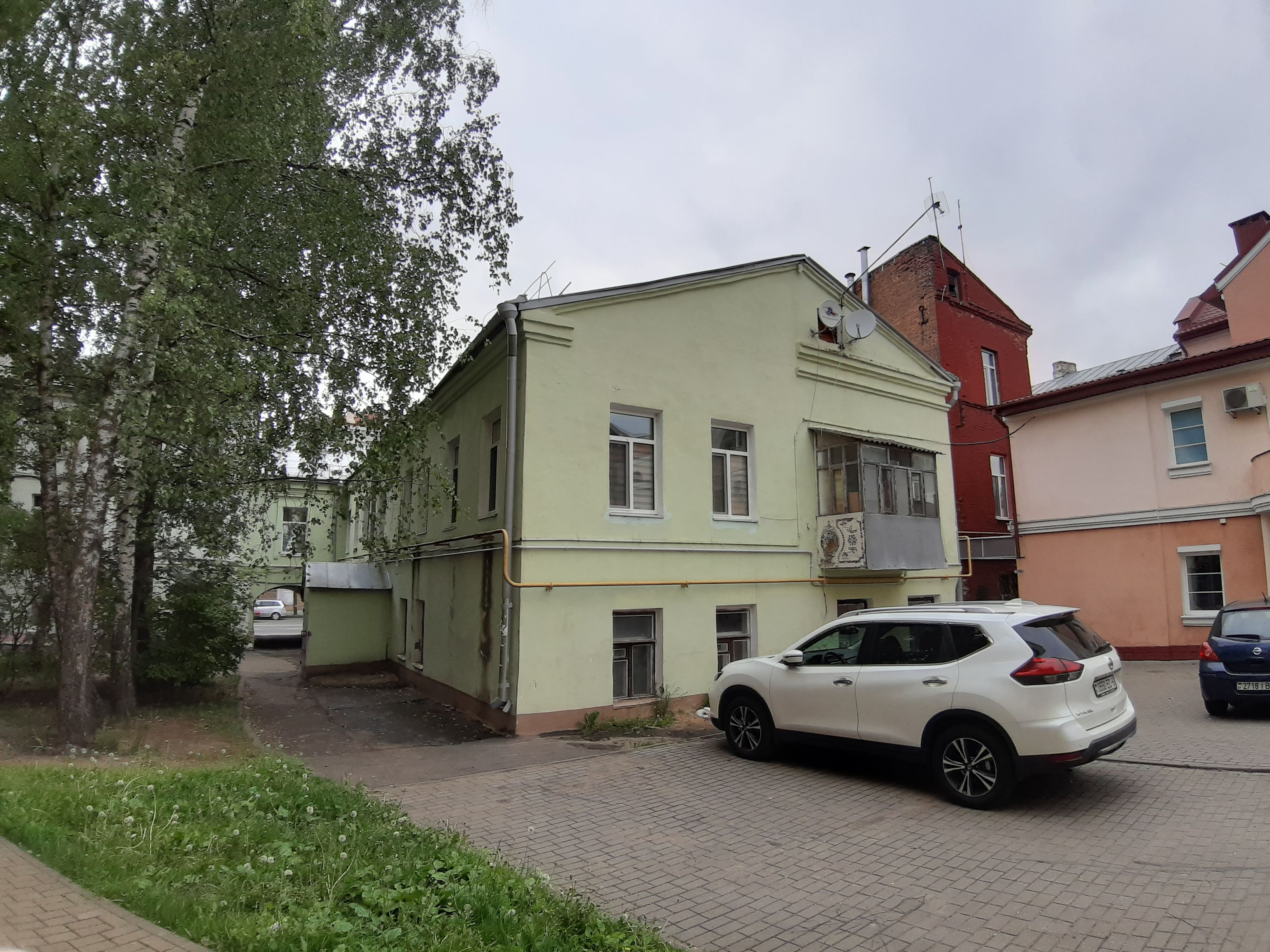 Магілёў у 2019 г.